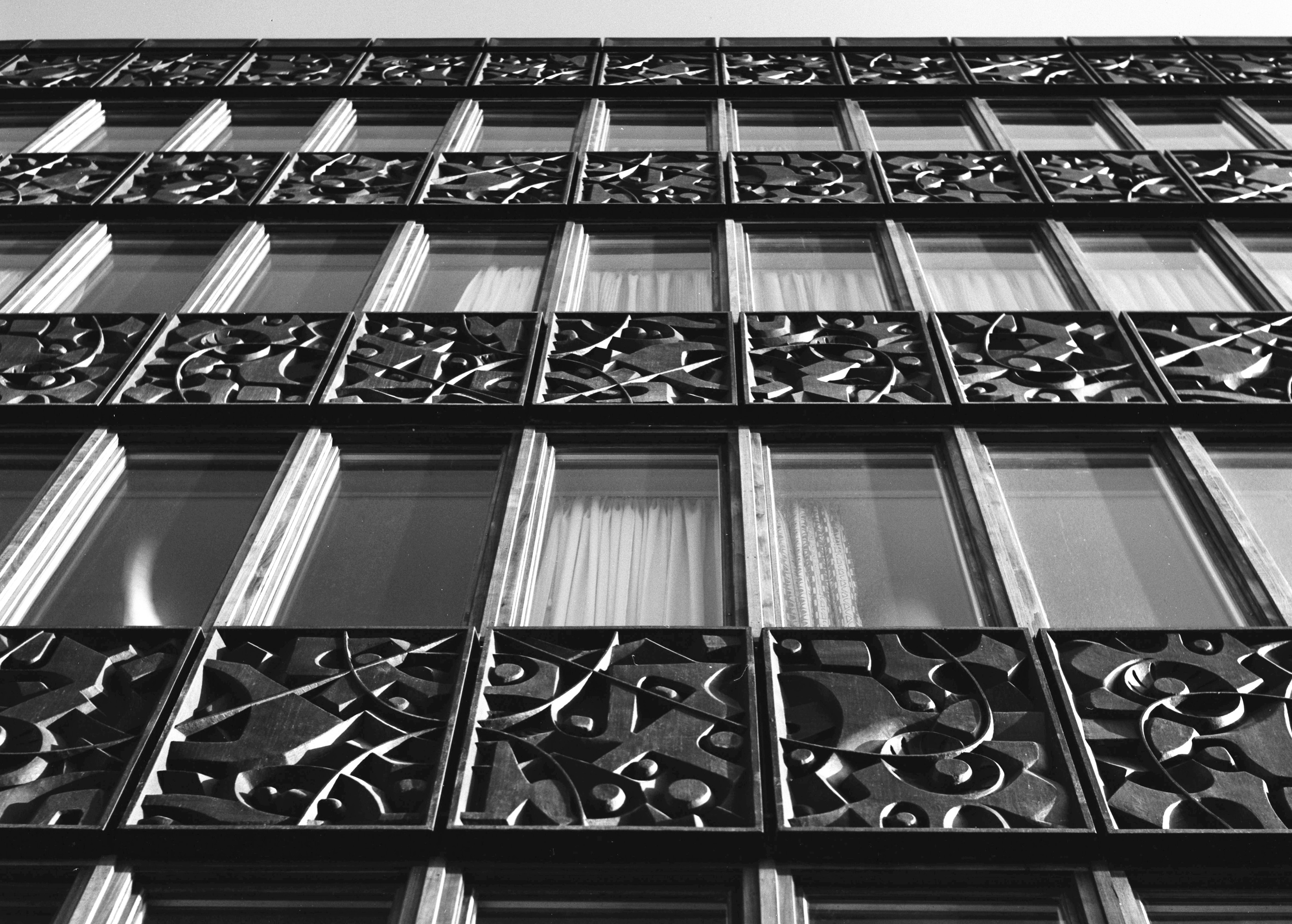 Fastigheten Vreten 17, Västberga industriområde, fasadstudie.